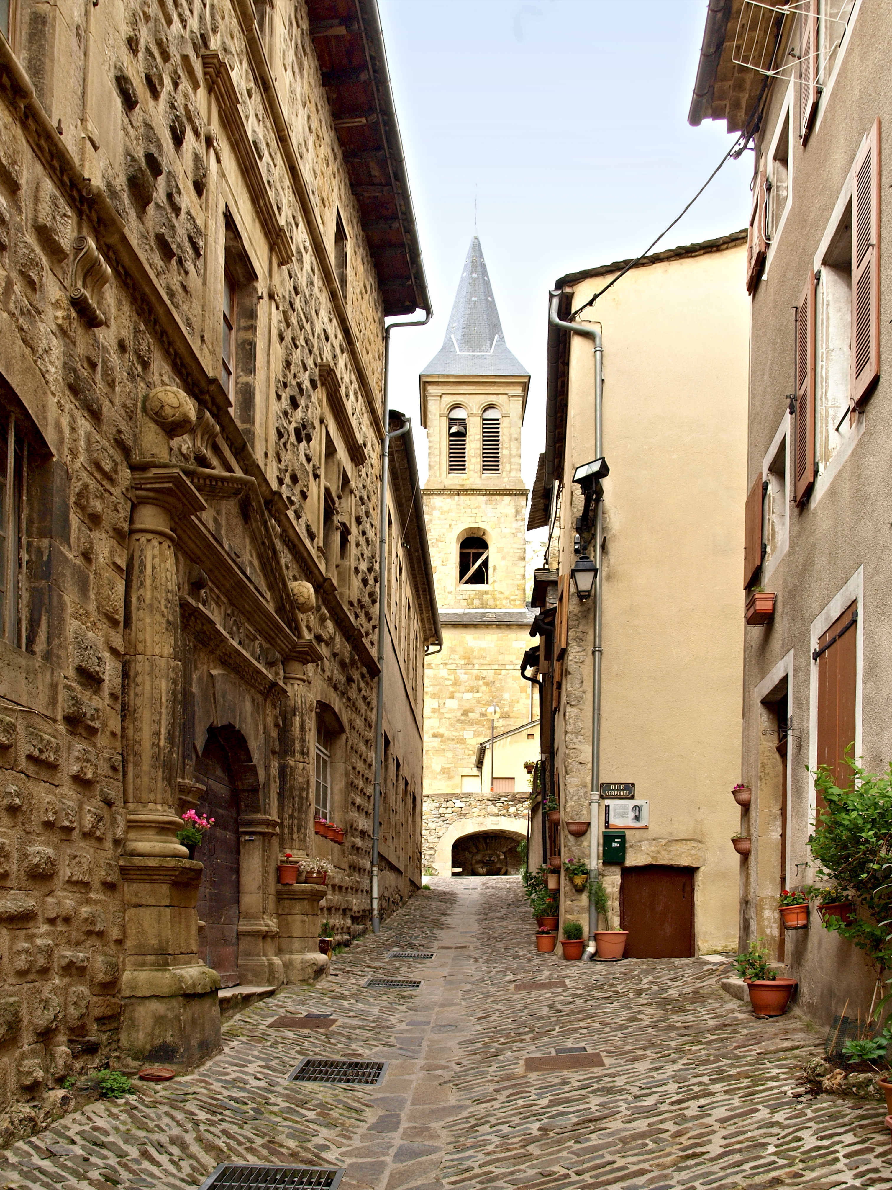 Florac (Lozère) - Rue de l'église. A gauche l'ancien couvent